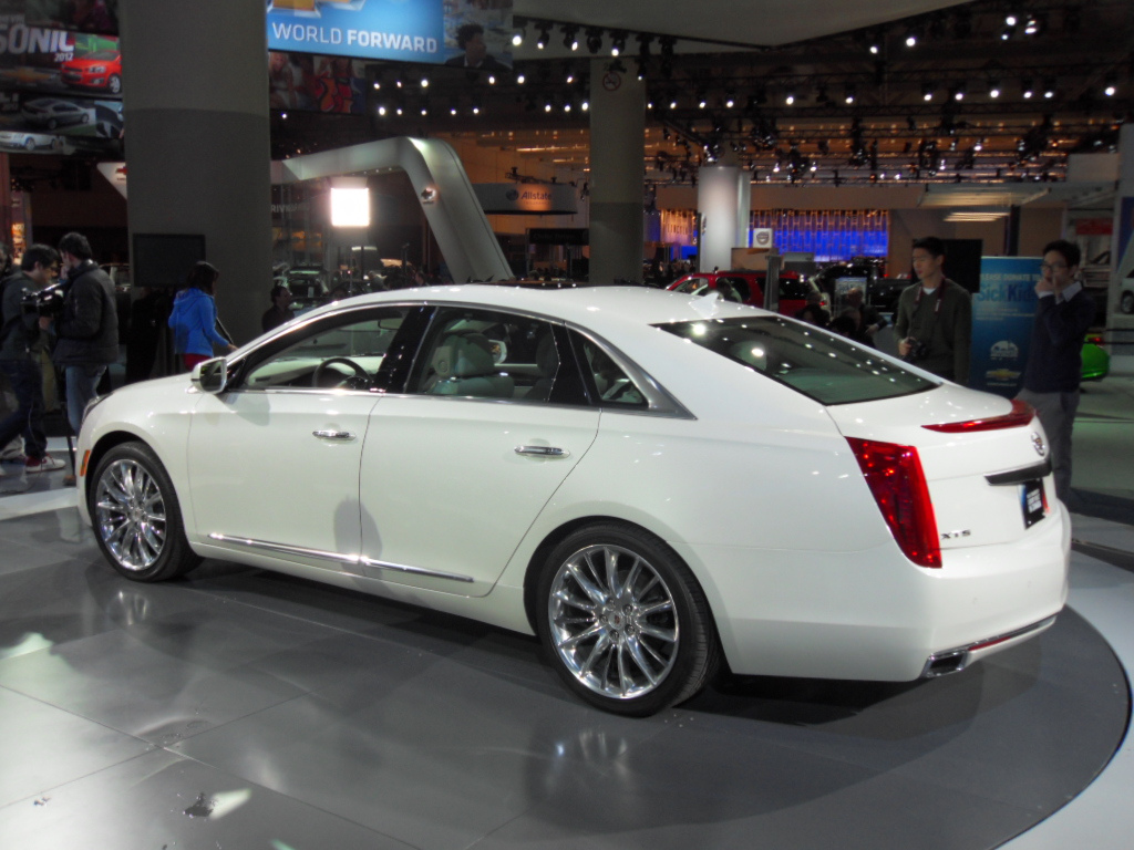 SDC11646